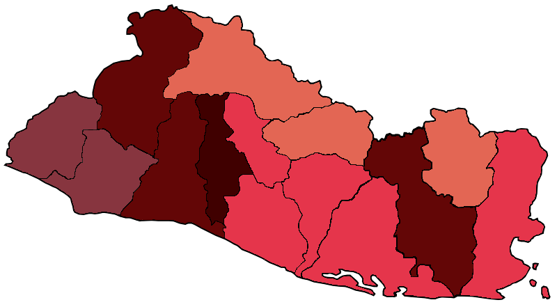 Mapa de los departamentos de El Salvador con casos confirmados de COVID-19